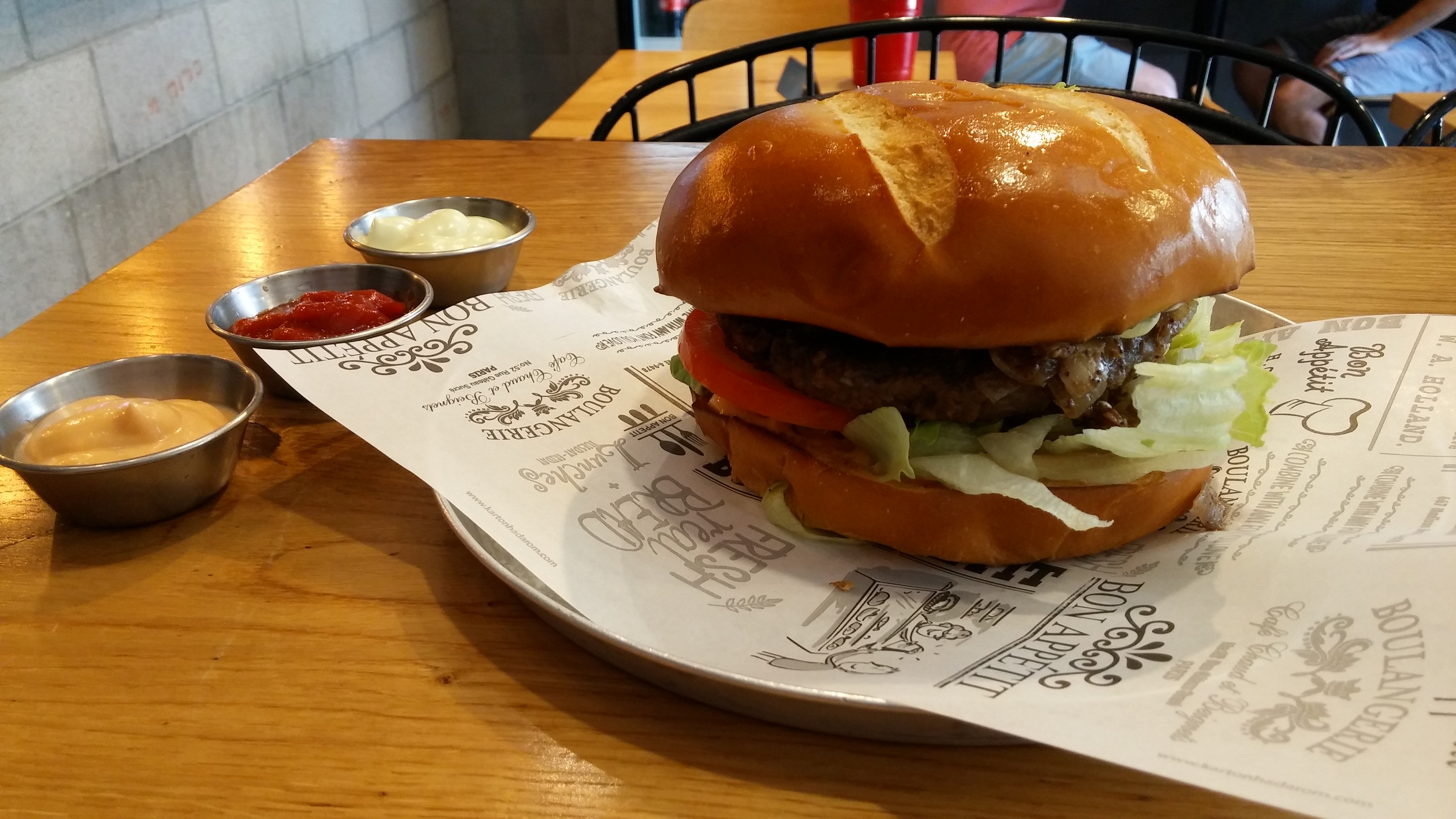 המבורגר טבעוני - מסעדת גודנס, תל אביב